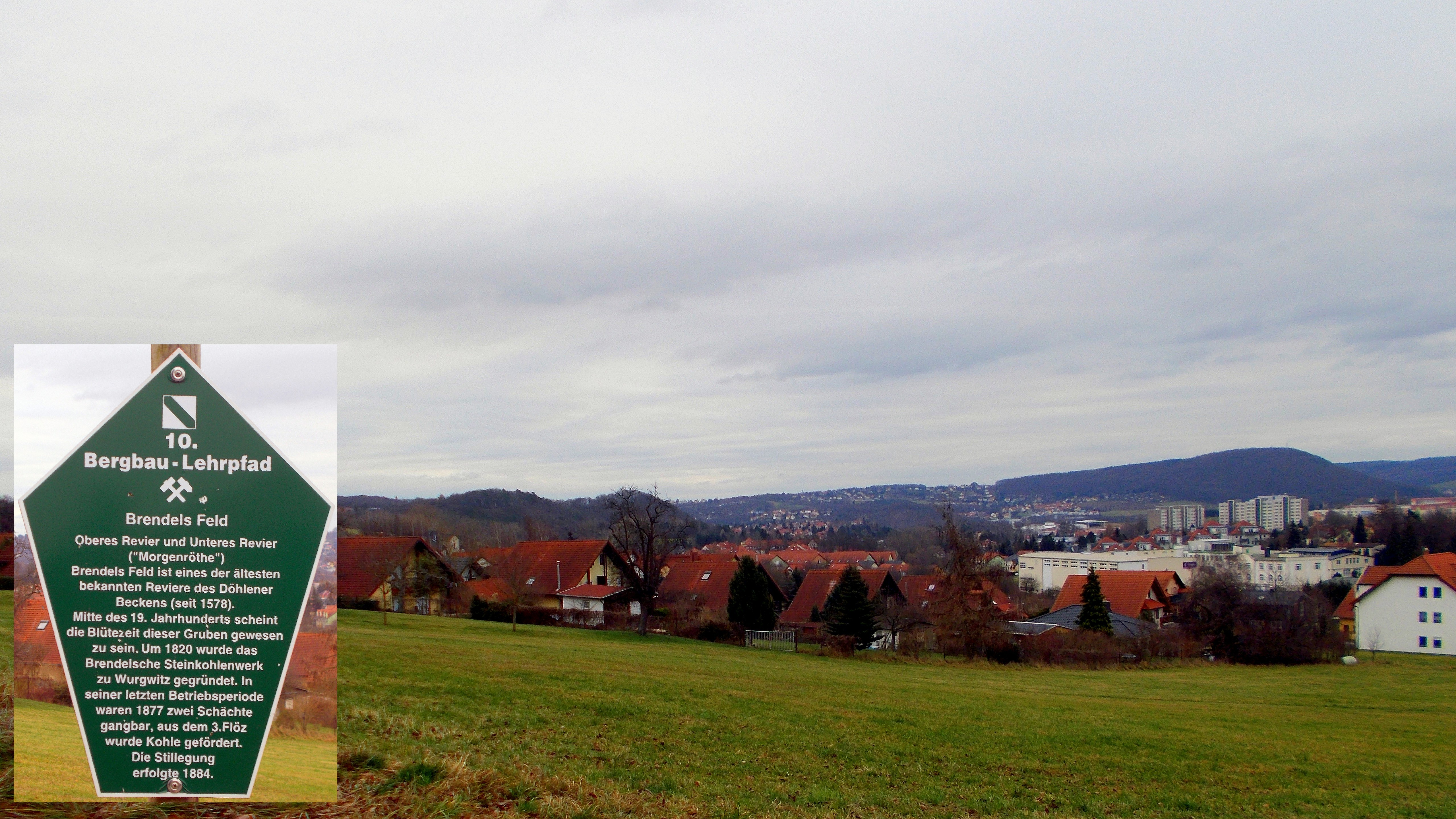 Ehemaliges Schachtgelände